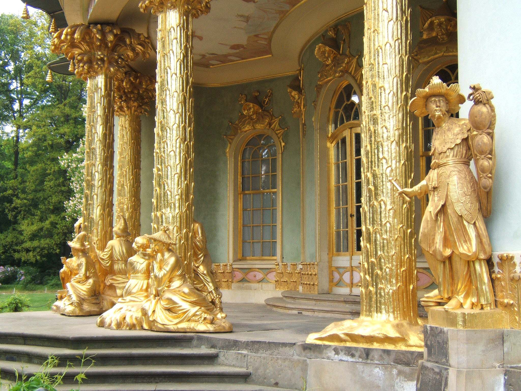 Chinesisches Teehaus in Potsdam im Park Sanssouci.jpg